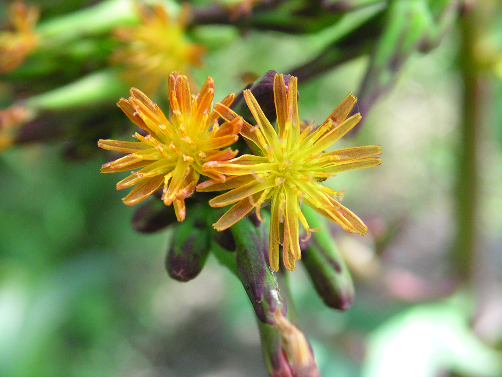 Lactuca_sp_1